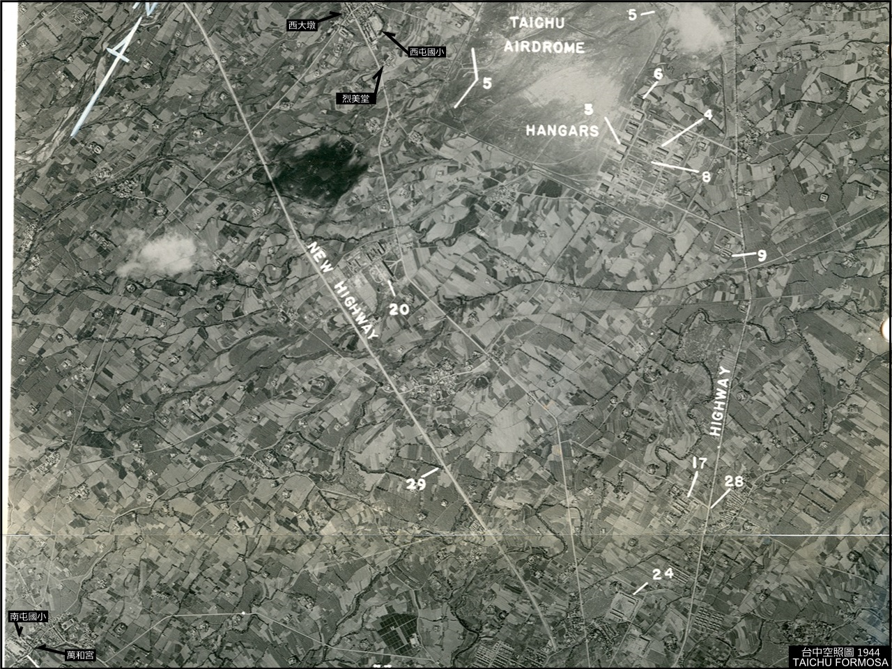 中文（台灣）: 台中西屯南屯1944空照圖